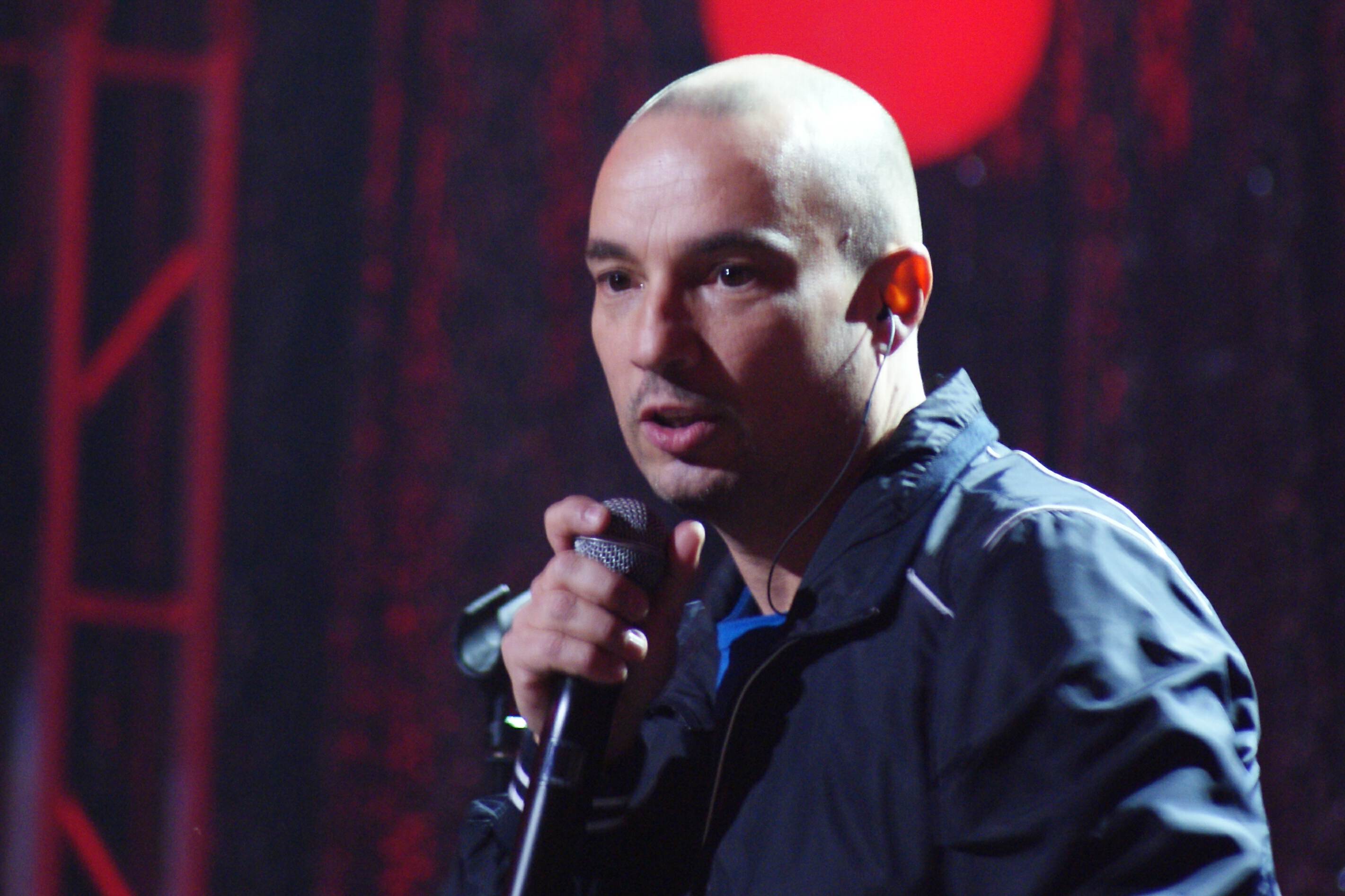 Stachursky podczas Krajowych Eliminacji Eurowizji 2011